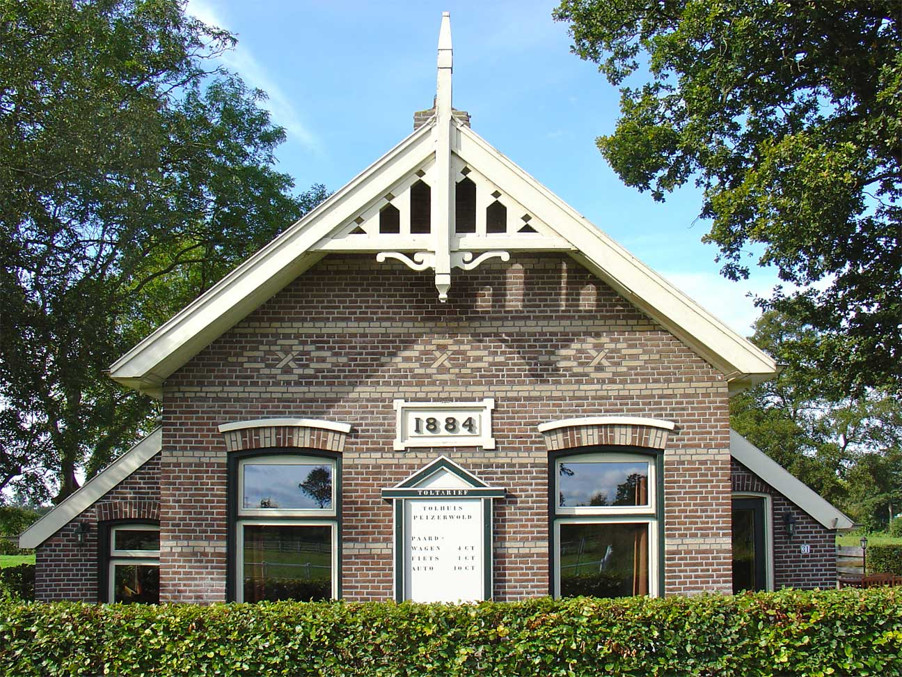 Tolhuis Peizerwold